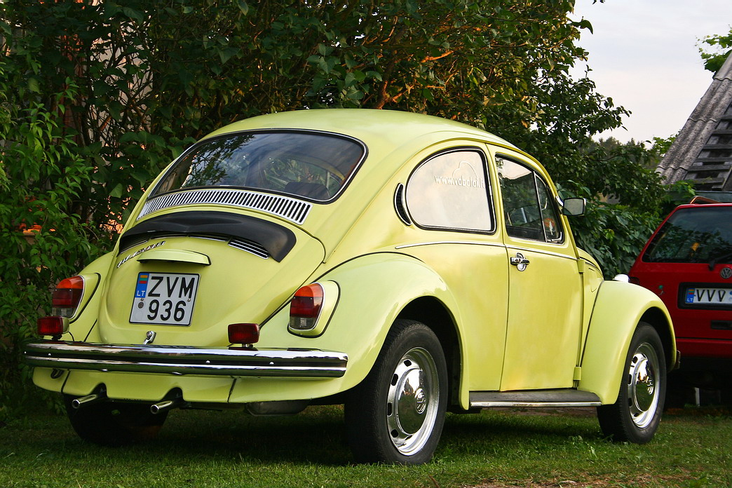 VW Kaefer 1300, 1972 model. Aftermarket engine raincover and fog lights added.